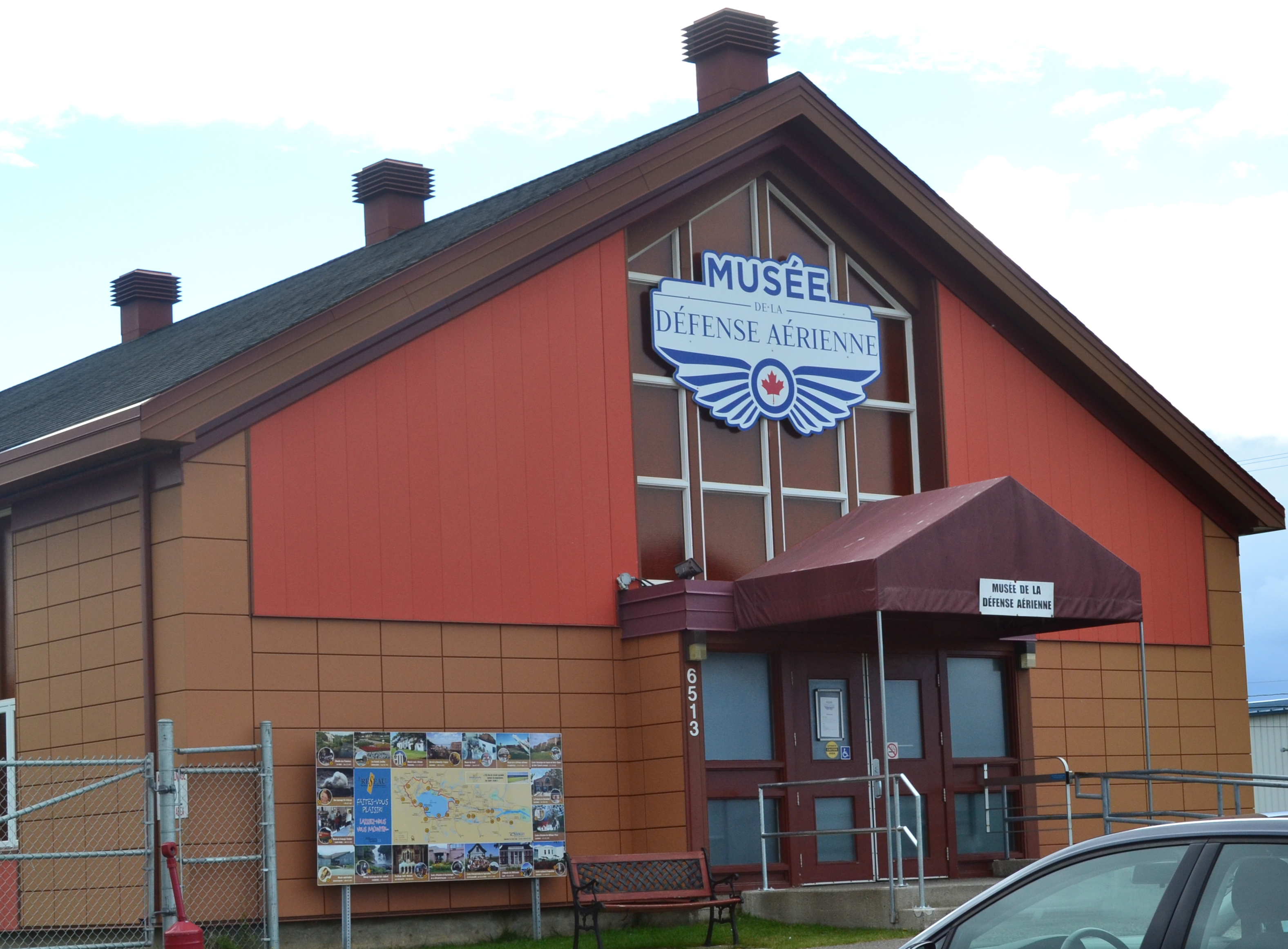 Entrée du musée de la Défense aérienne